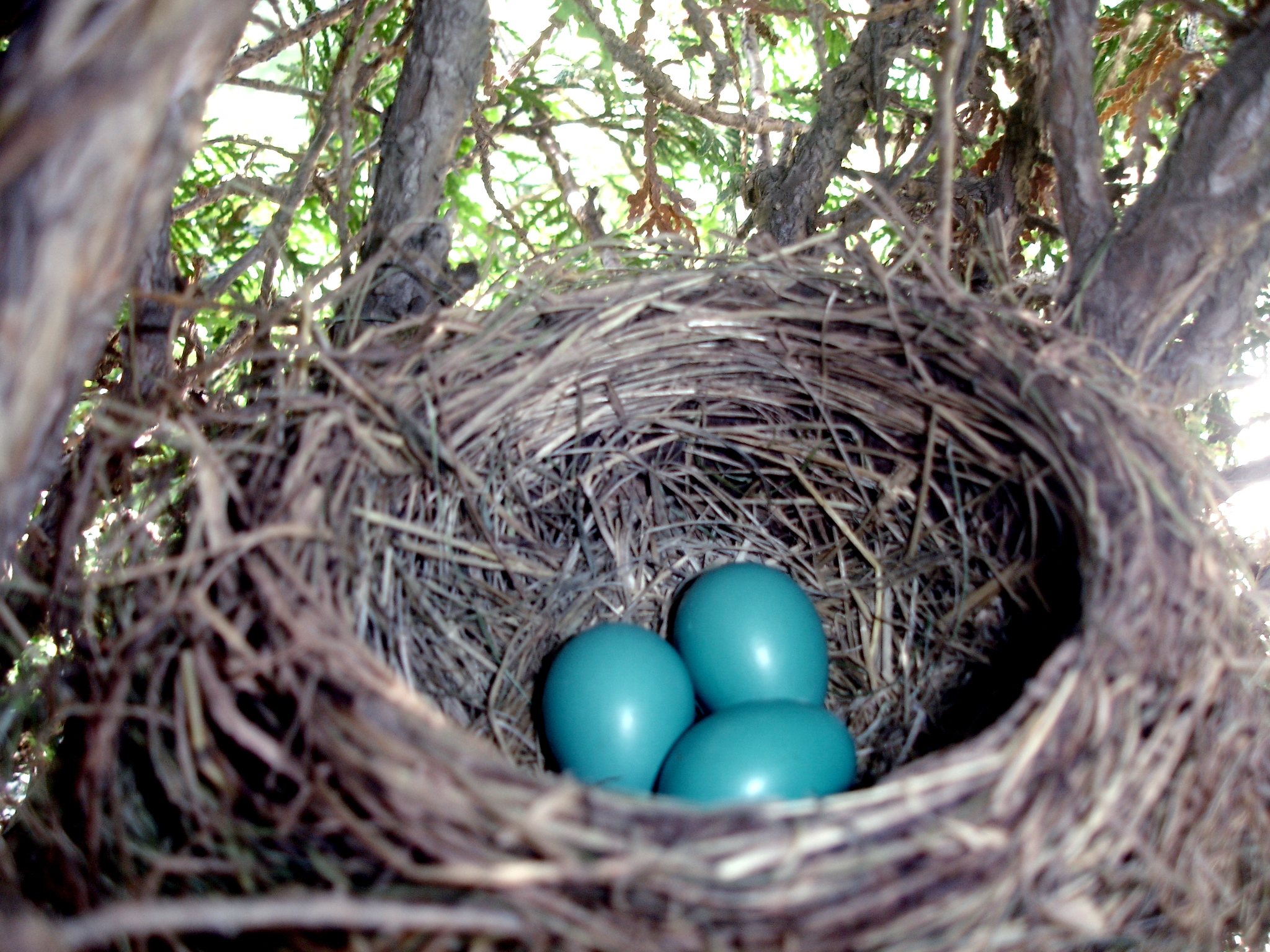 അമേരിക്കൻ റോബിൻ എന്ന പക്ഷിയുടെ മുട്ട. ഫിലാഡെൽഫിയയായുടെ പ്രാന്തപ്രദേശത്തു നിന്നും എടുത്ത ചിത്രം.